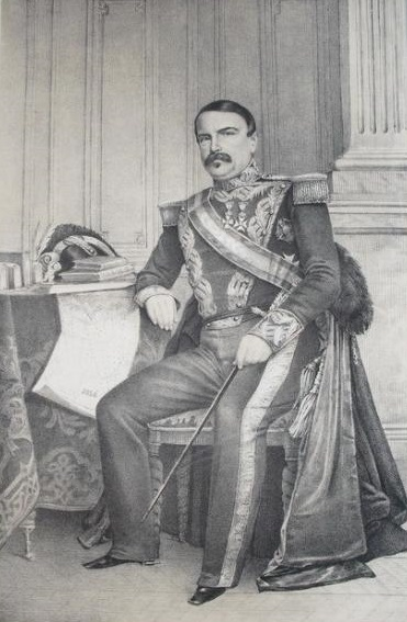 Retrato del general español Juan Antonio de Urbiztondo y Eguía (1803-1857), marqués de la Solana, gobernador de Filipinas y ministro de la Guerra durante el reinado de Isabel II. Dibujado y litografiado por Luis Carlos Legrand en la litografía de J. Donon (Madrid). Apareció ilustrando la obra de Pedro Chamorro y Baquerizo, Estado Mayor General del Ejército español.